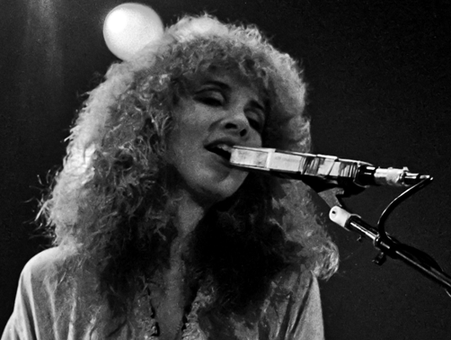 Stevie Nicks (Fleetwood Mac) en concert à Zürich en 1980.